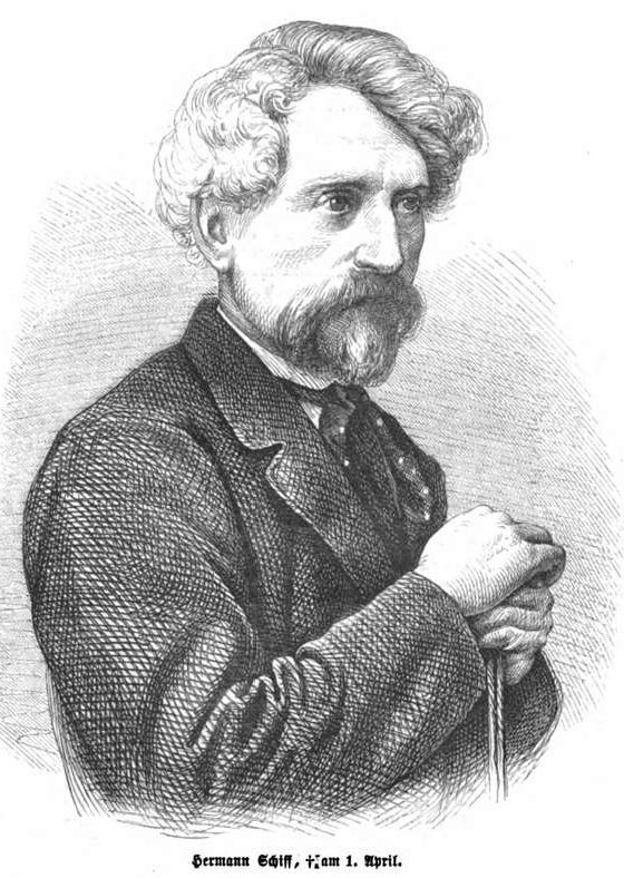 Hermann Schiff, deutscher Schriftsteller im 19. Jh.